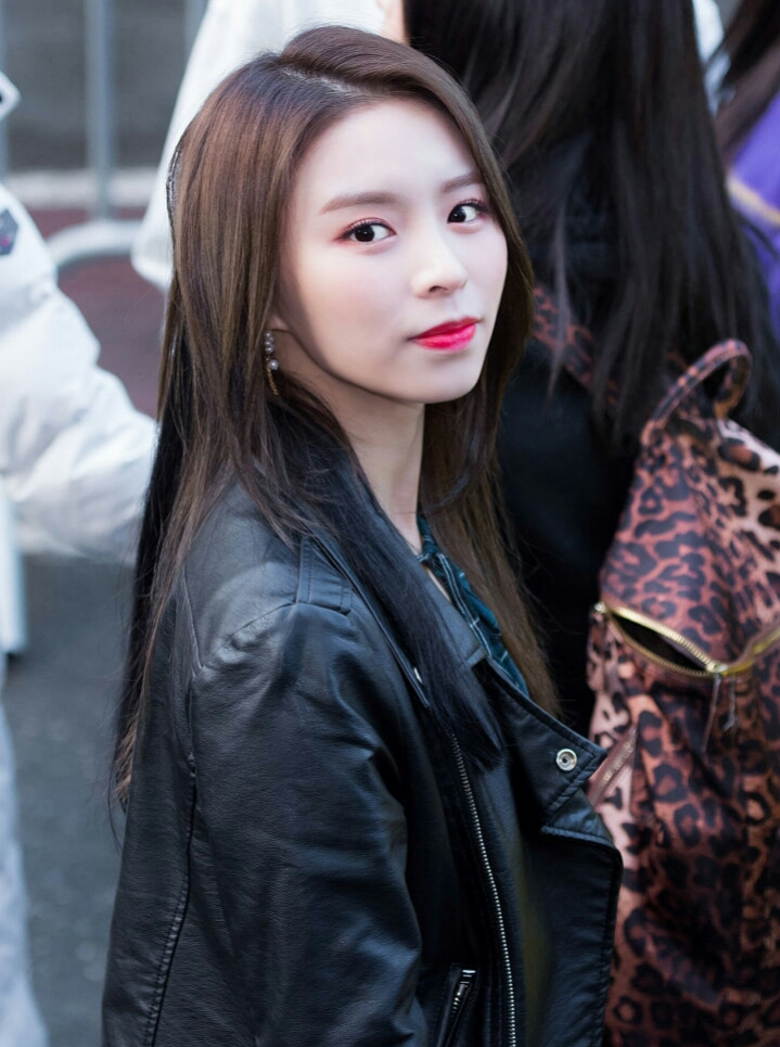 한국어 (조선): 180223 뮤직뱅크 출근길 CLC